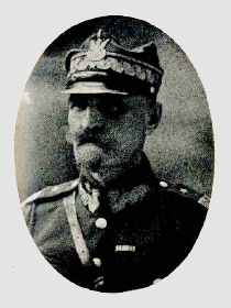 gen. Aleksander Romanowicz